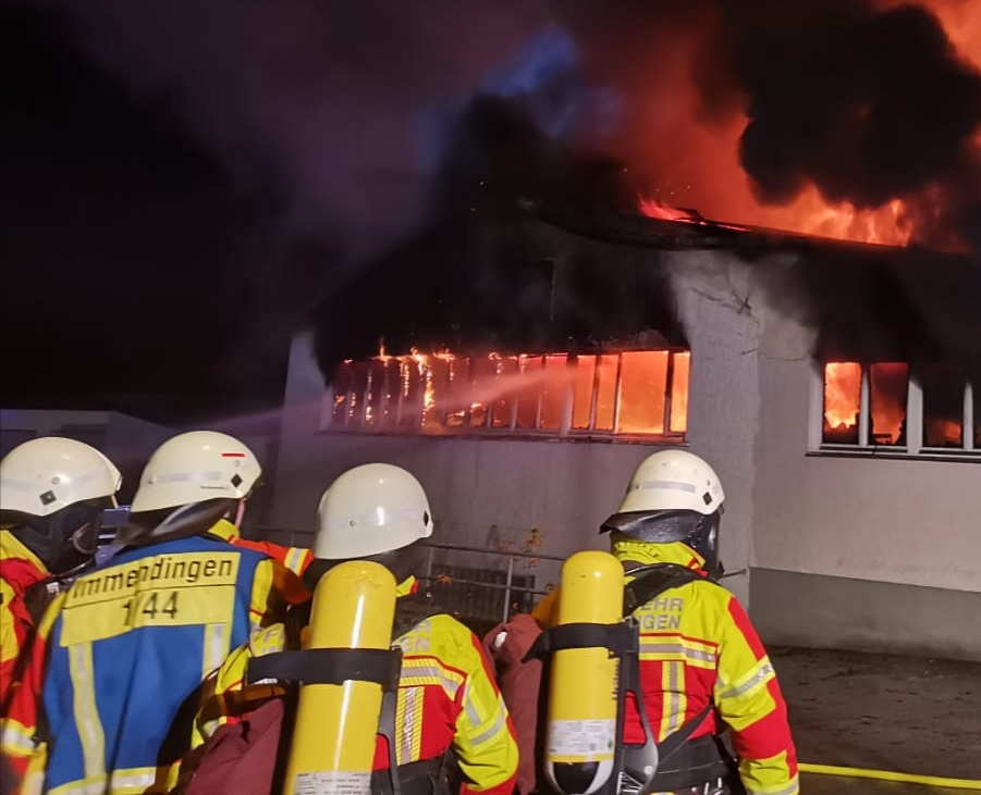 Feuerwehr Einsatz 11/2019